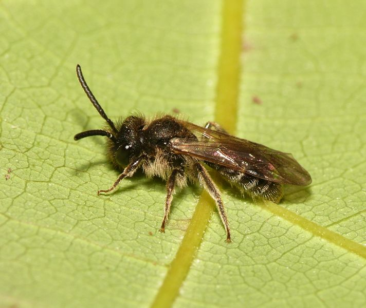 Andrena minutula. Location: Rhenen - Blauwe Kamer - Gelderland (The Netherlands)